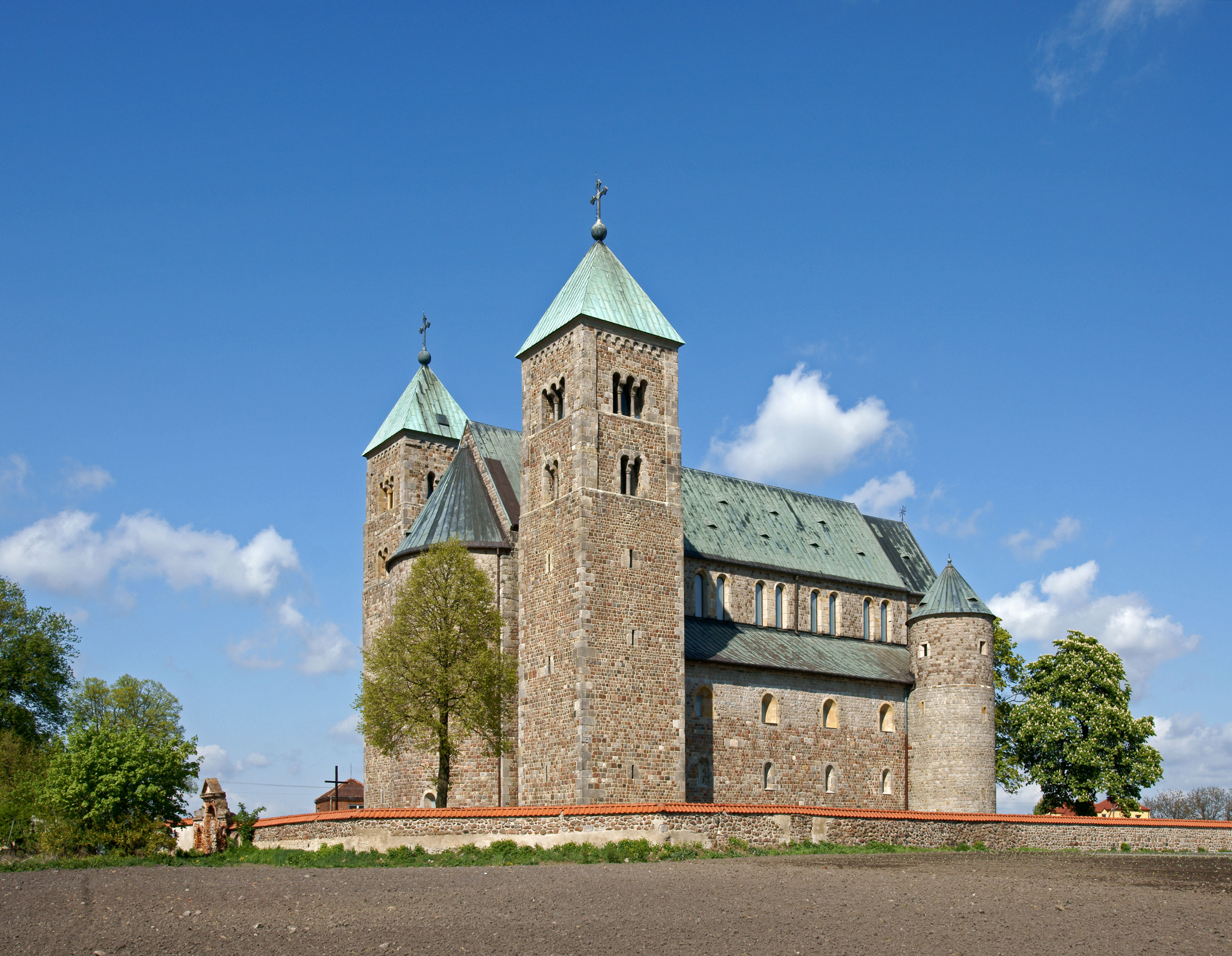 kolegiata NMP i św. Aleksego w Tumie